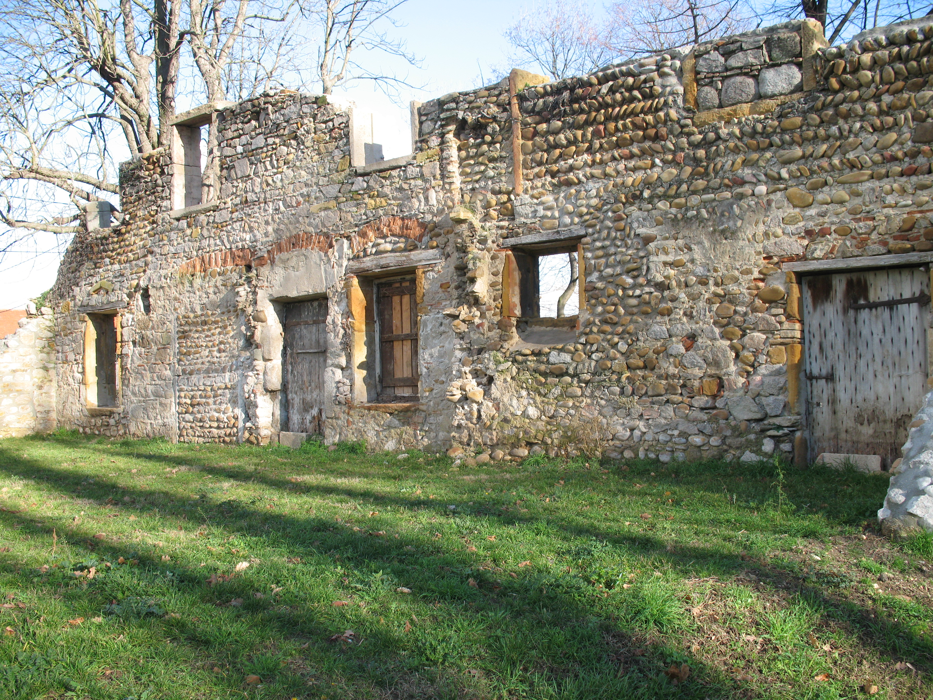 Ruines du château de Beauregard à Saint-Genis-Laval dans le Rhône.